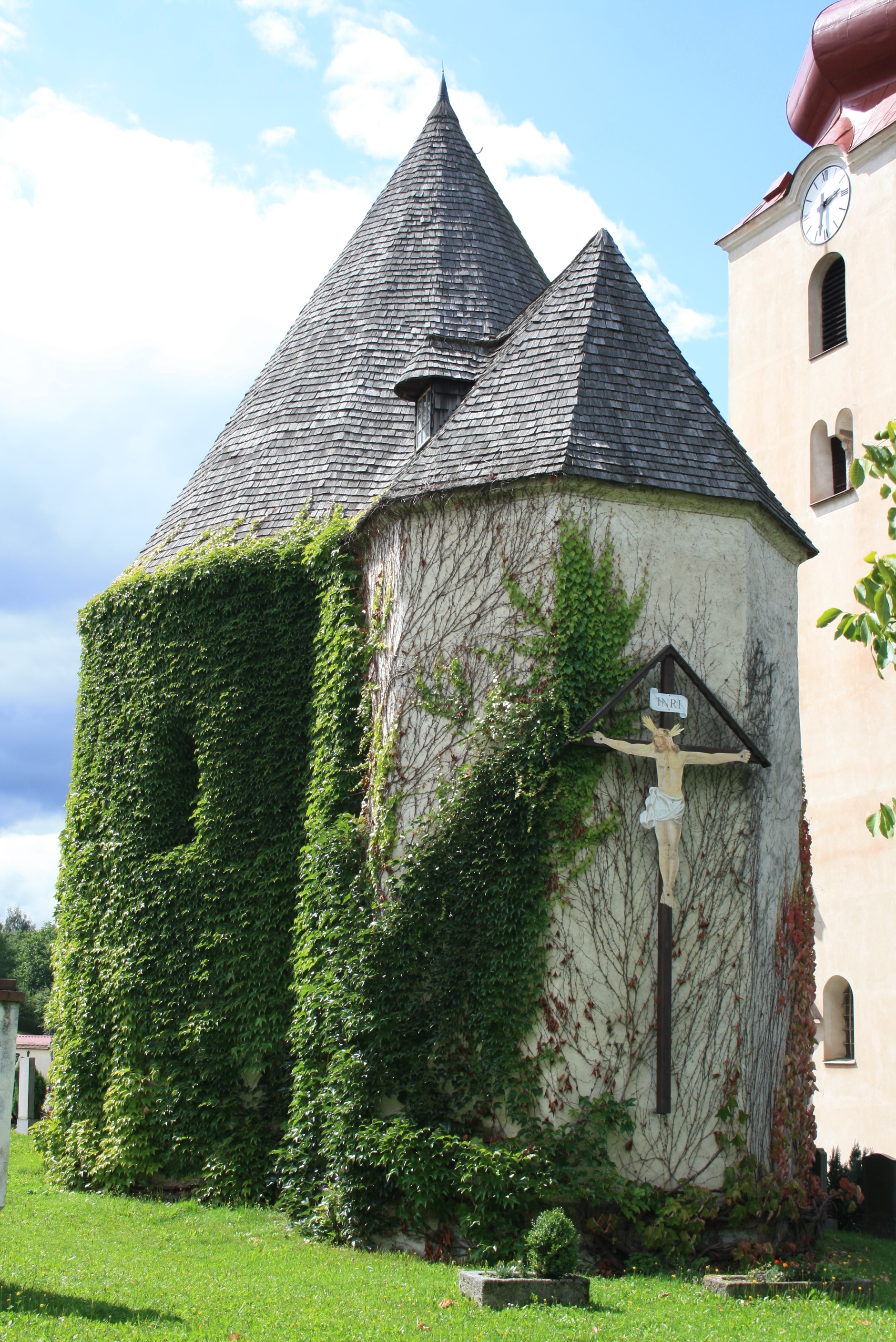 Außenansicht des Karners in Großglobnitz, Zwettl, Lower Austria